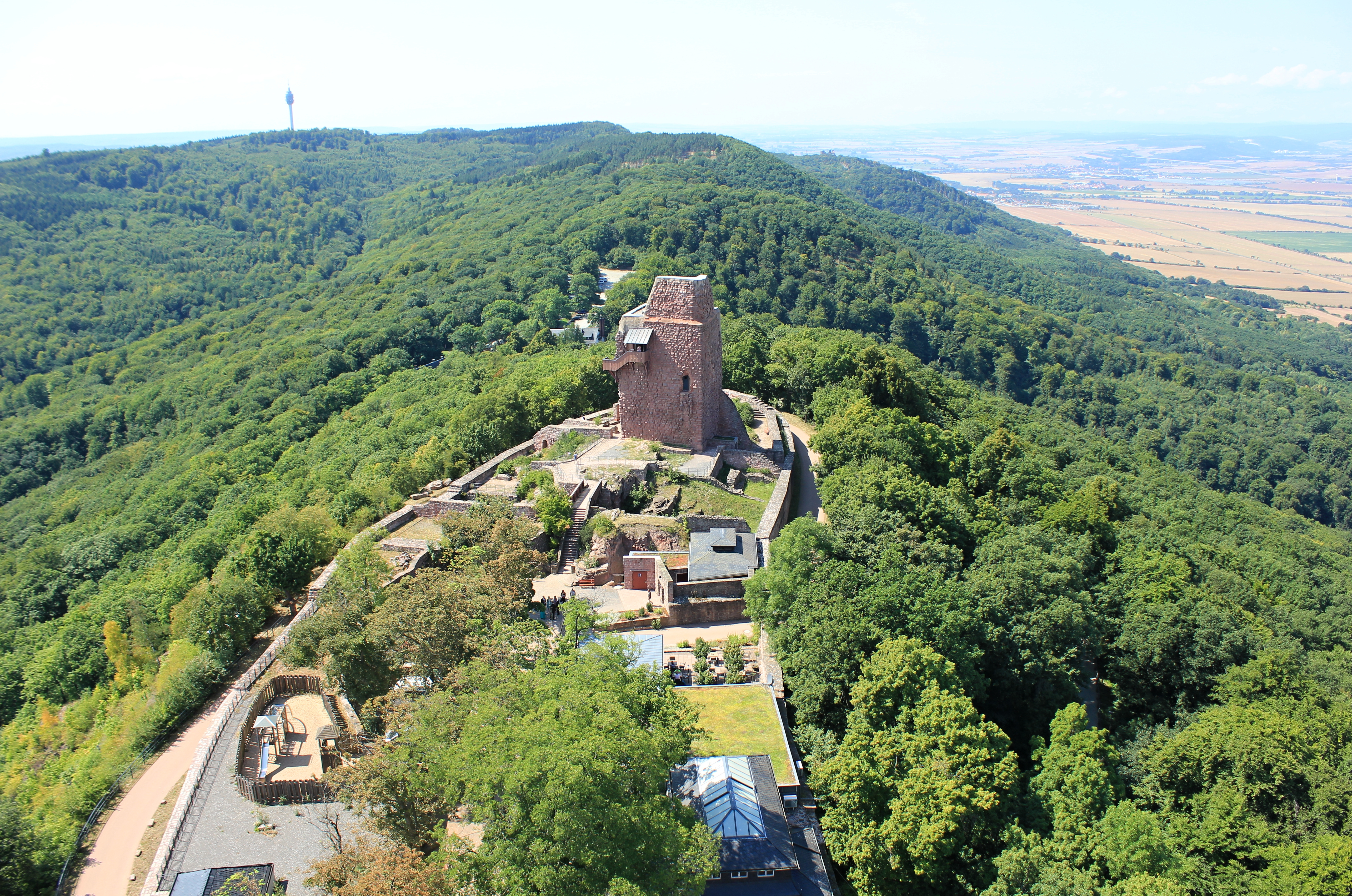 Kyffhäuser - Denkmalsanlage vom Turm aus.